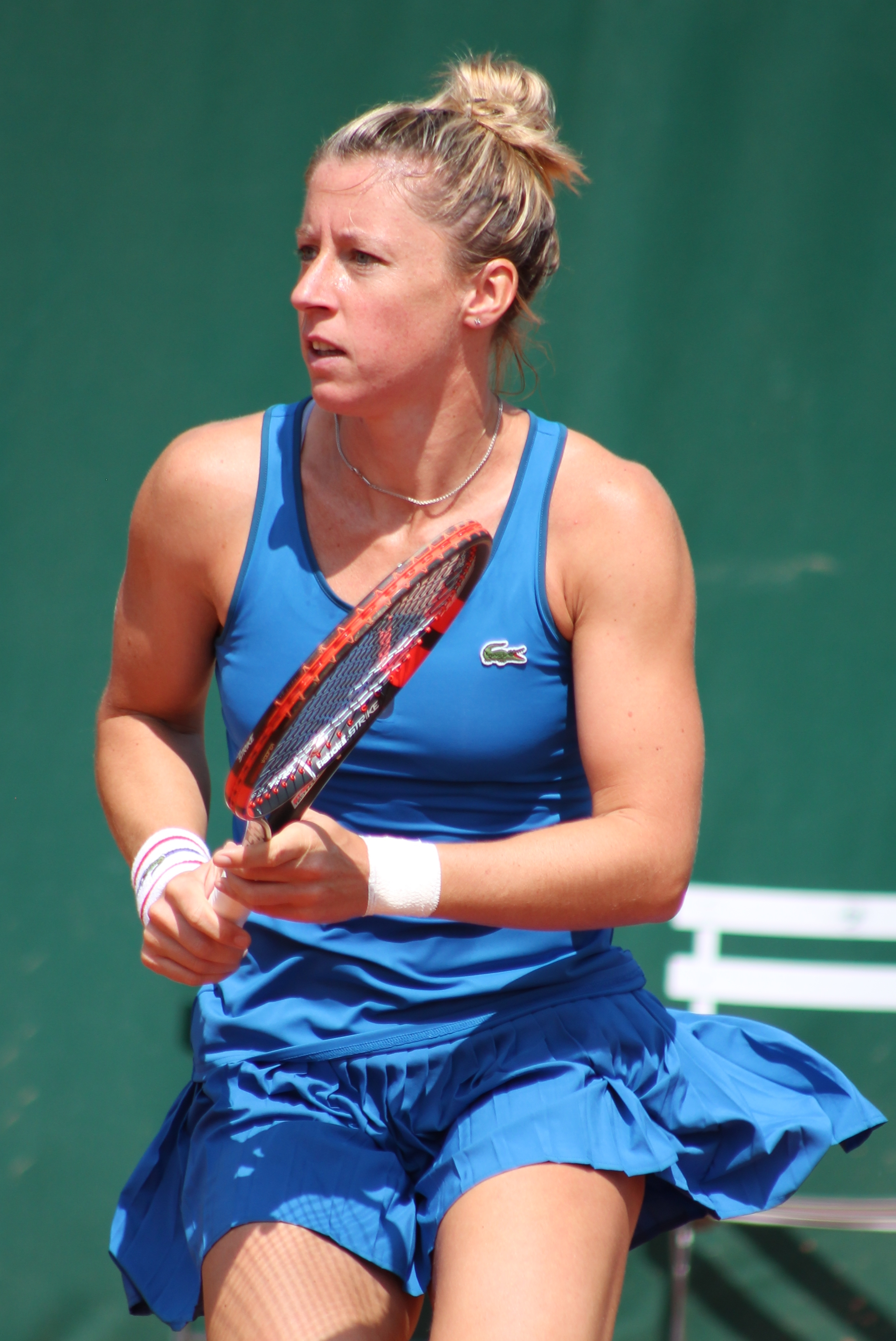 Parmentier RG15 (4)